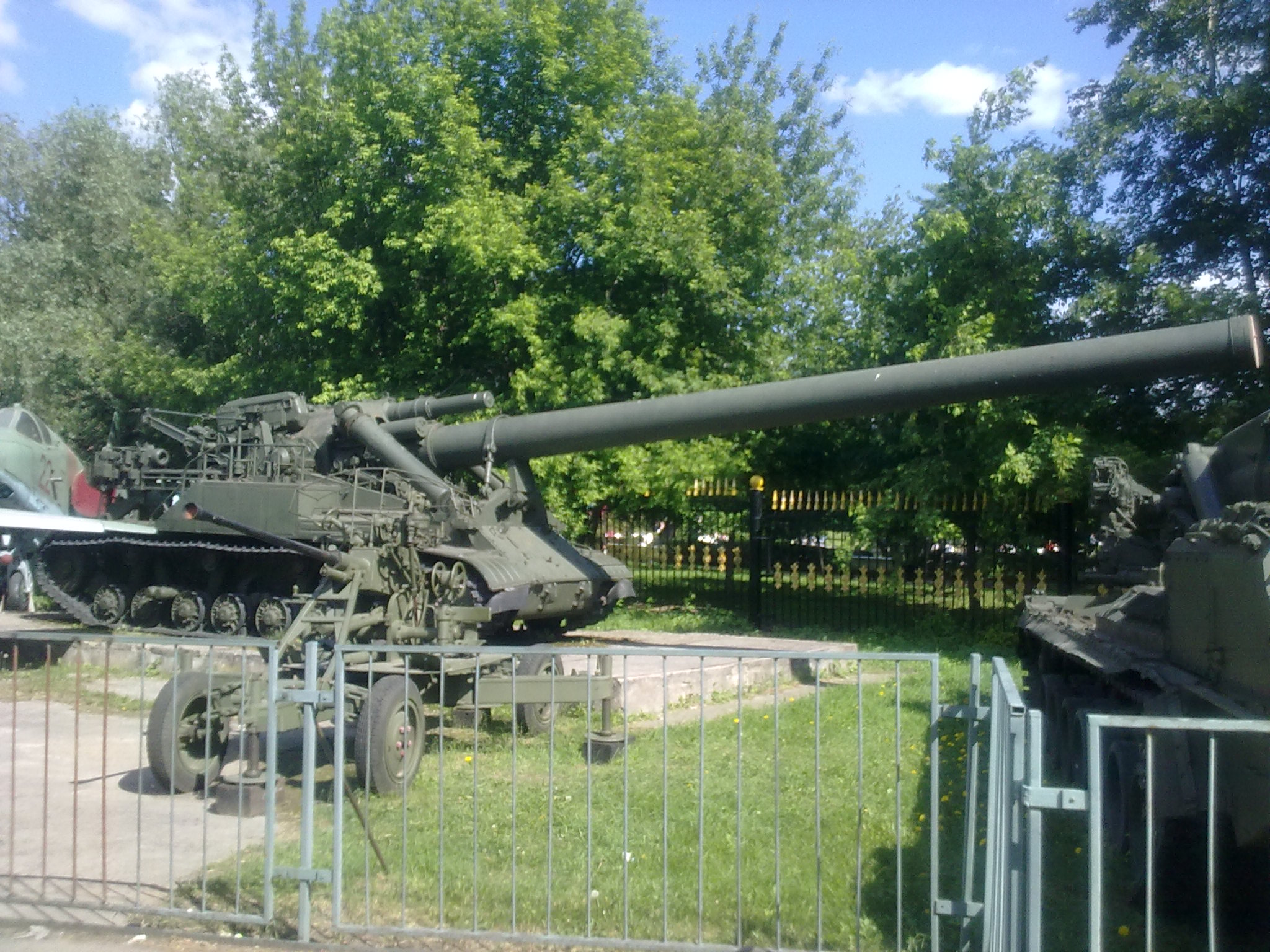 2А3 «Конденсатор» в Центральном музее вооруженных сил (г. Москва)